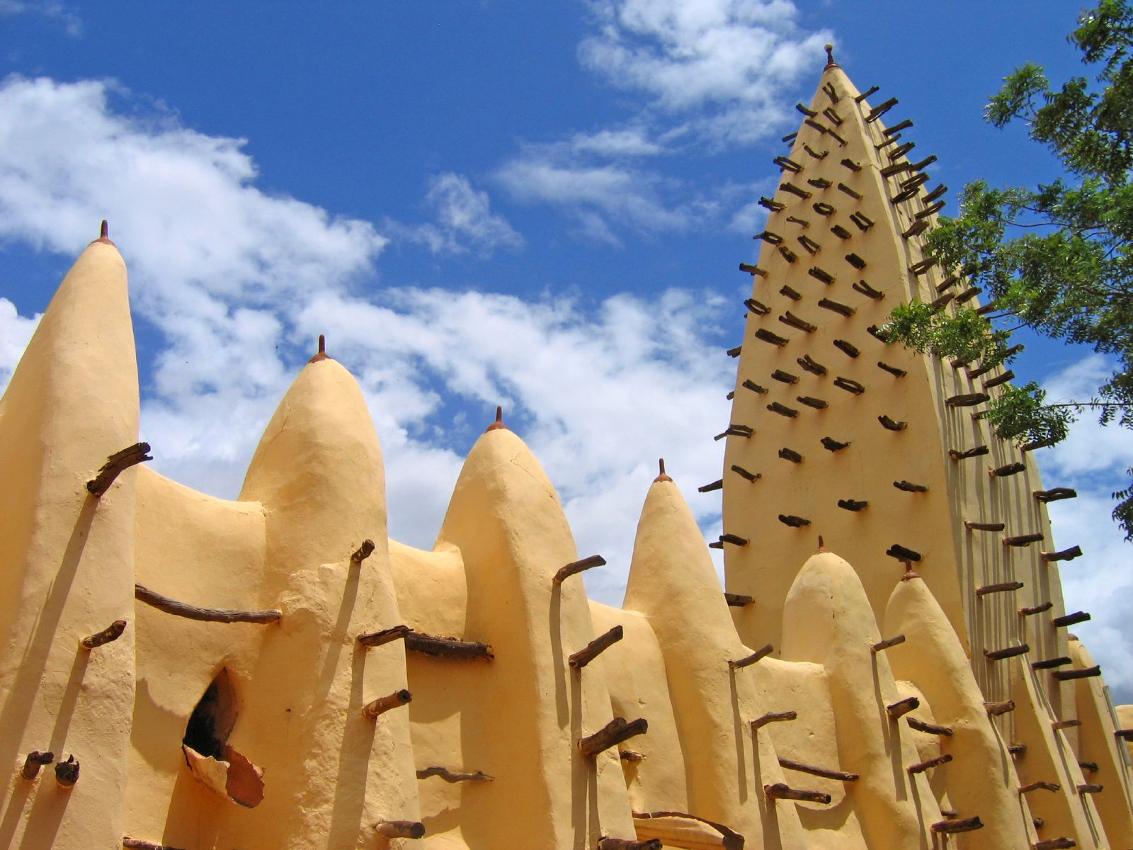 A mosque in Bobo-Dioulasso, Burkina Faso